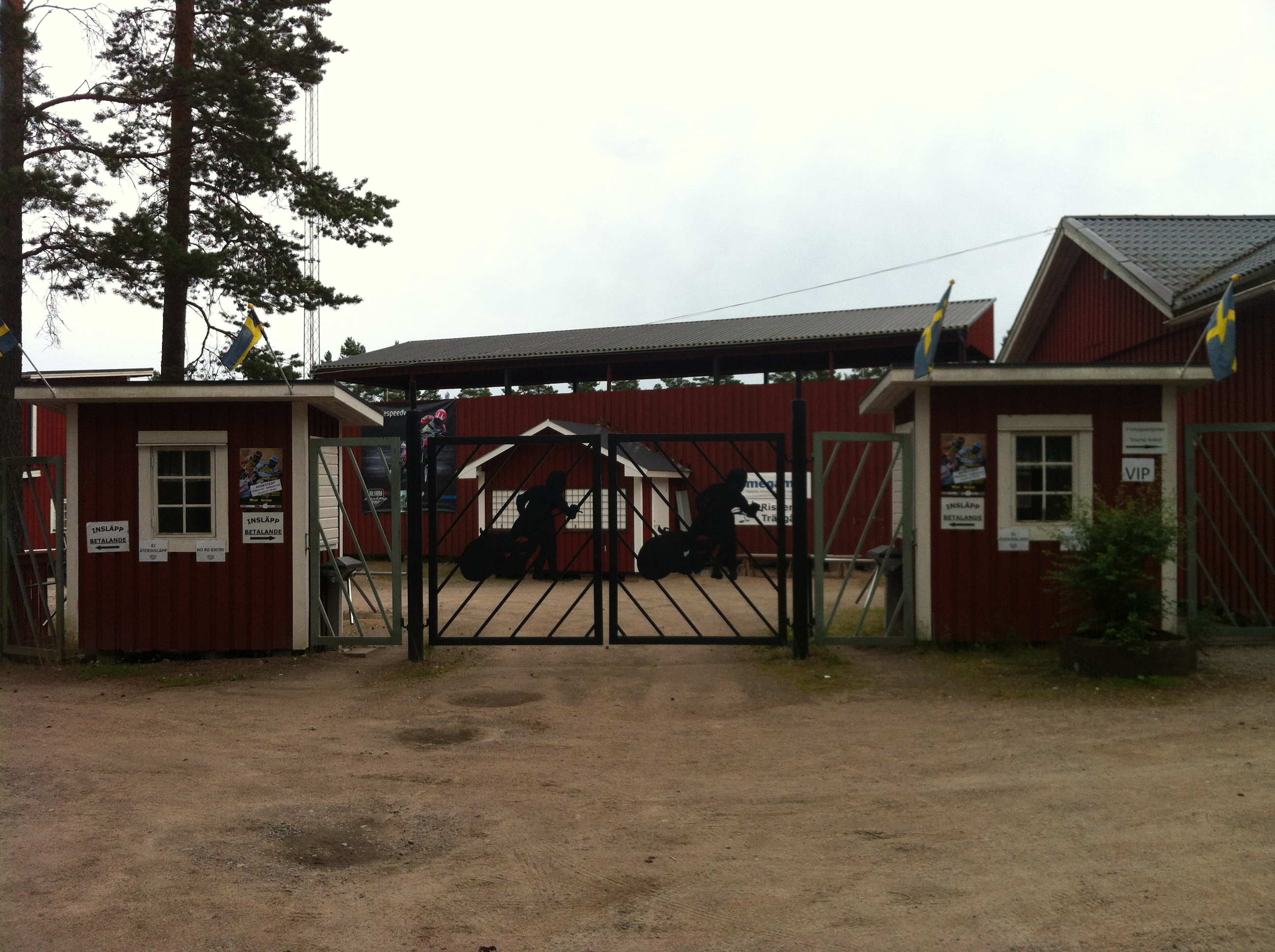 Huvudéntren till Wint Arena